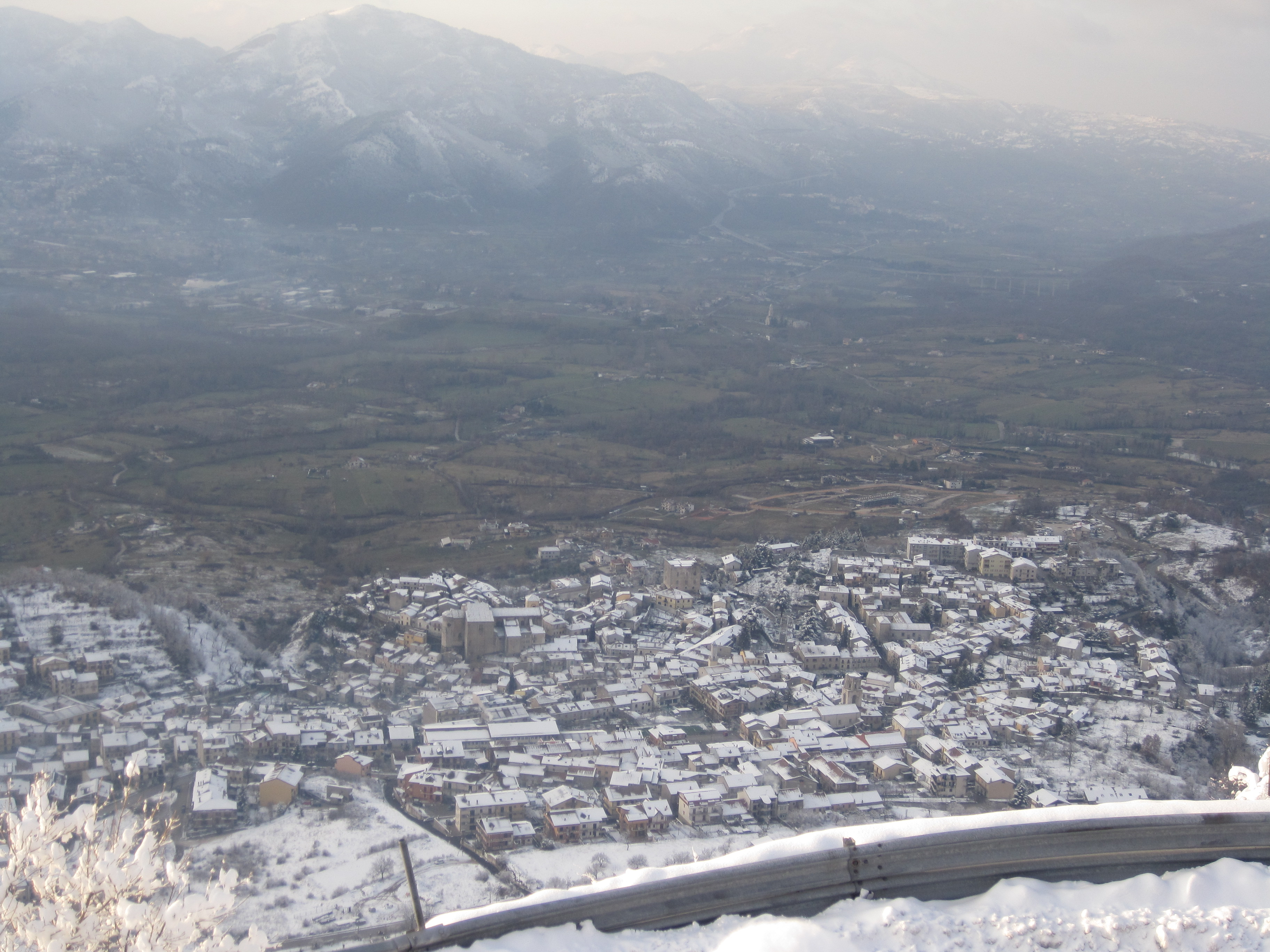 Foto scattata da me nel Gennaio scorso